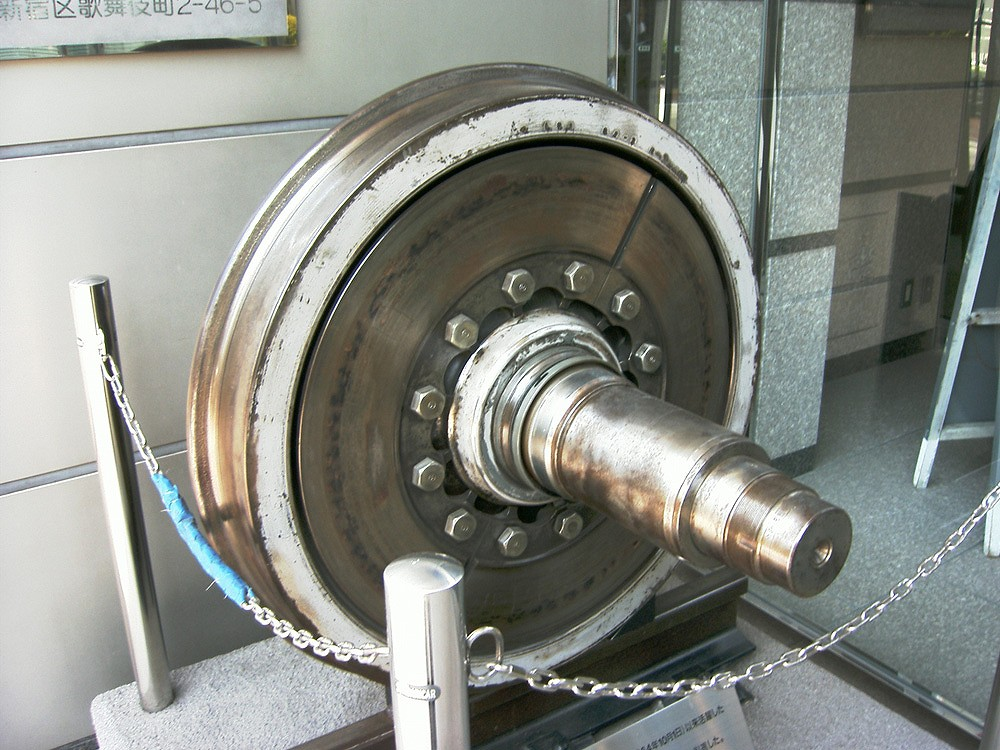 0_Series_Shinkansen_Wheel Tokyo Japan